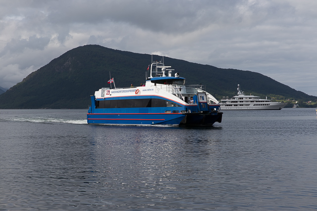 MS Rygerfonn i Rosendal